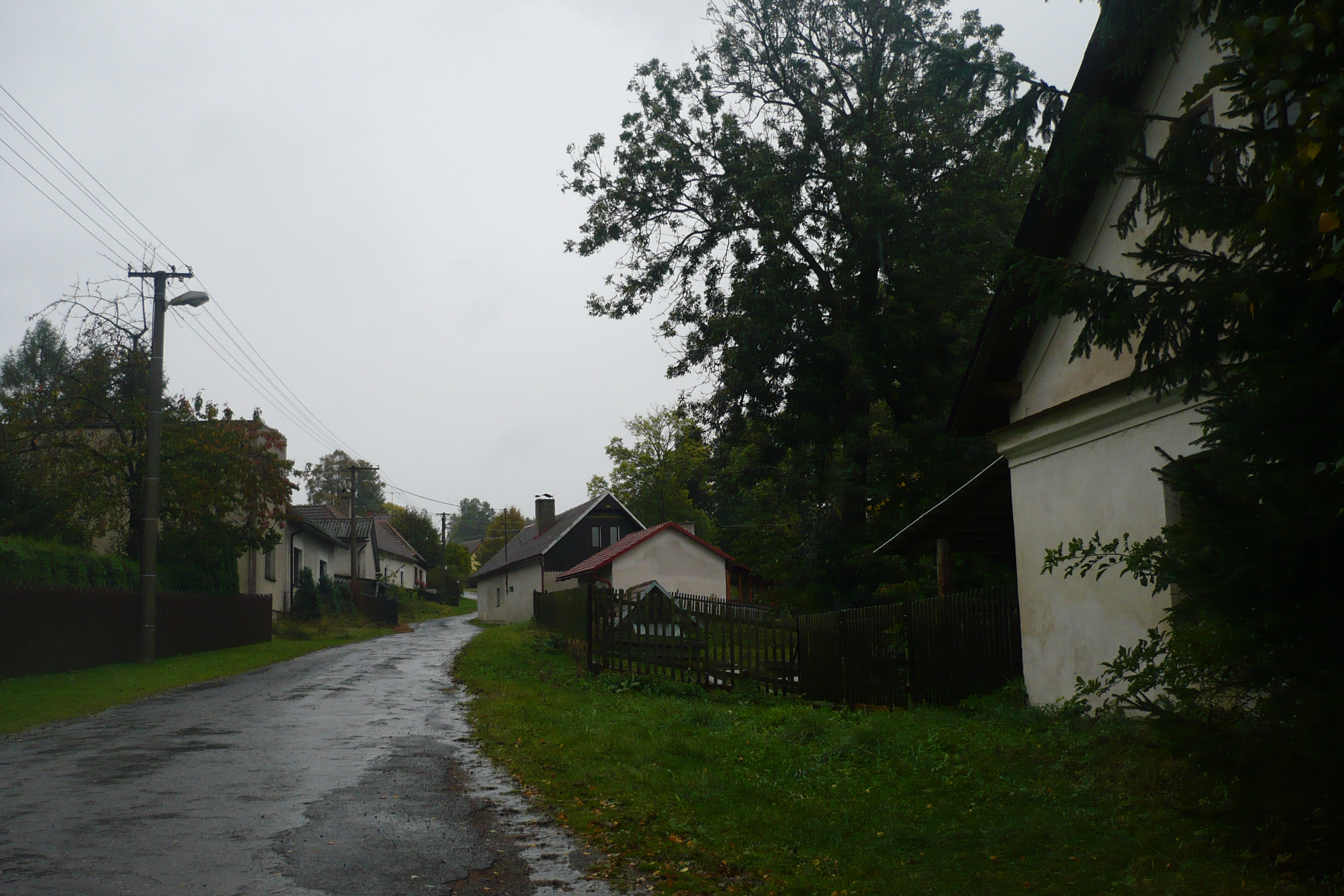 Česky: část obce zvaná Dolní Prosíčka